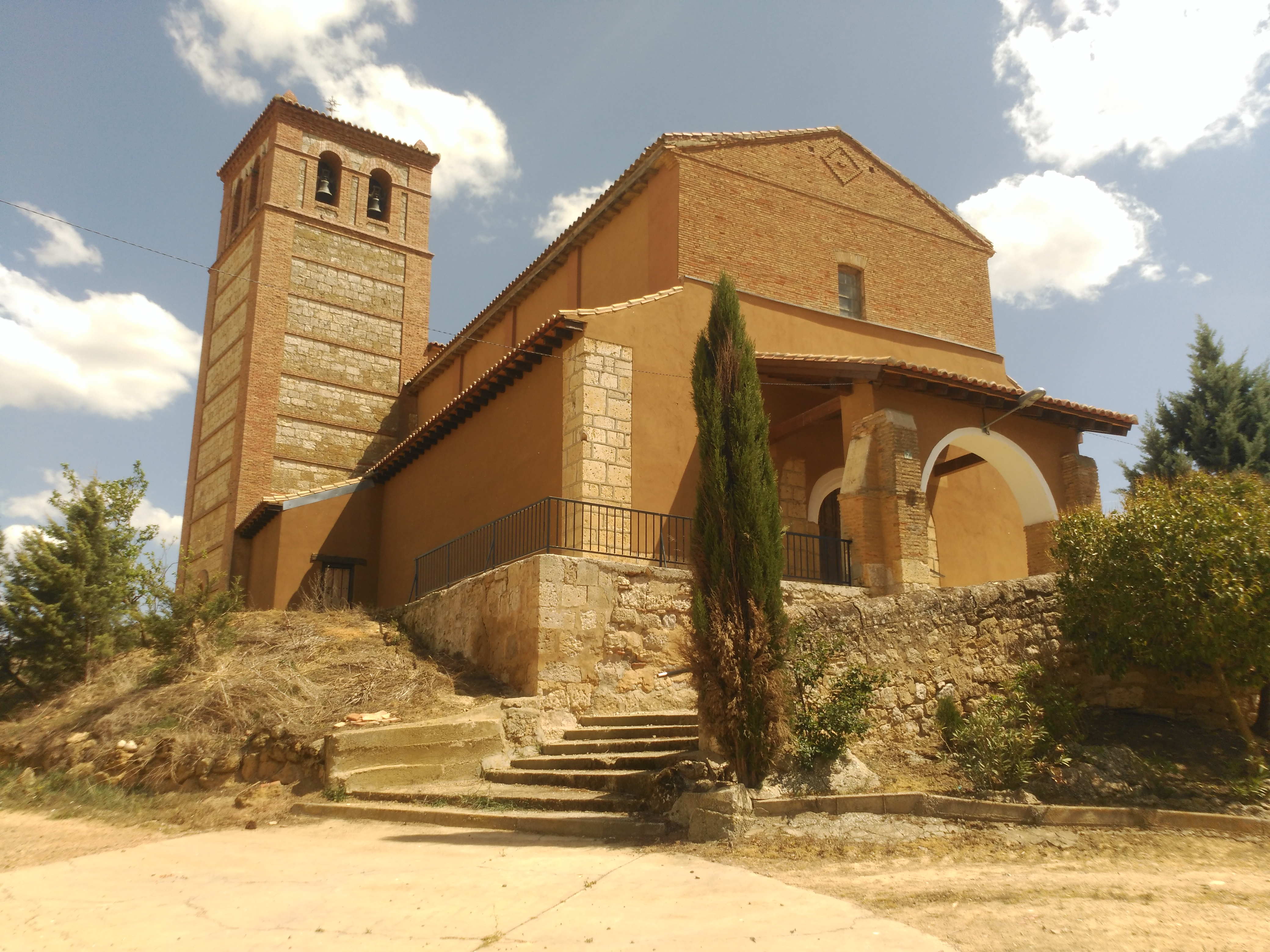 Iglesia de Nuestra Señora de la Calle (siglos XVI-XVII), parroquia de Villabaruz de Campos, en la provincia de Valladolid (España).